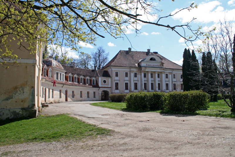 Saulaine (Kautsminde) palace